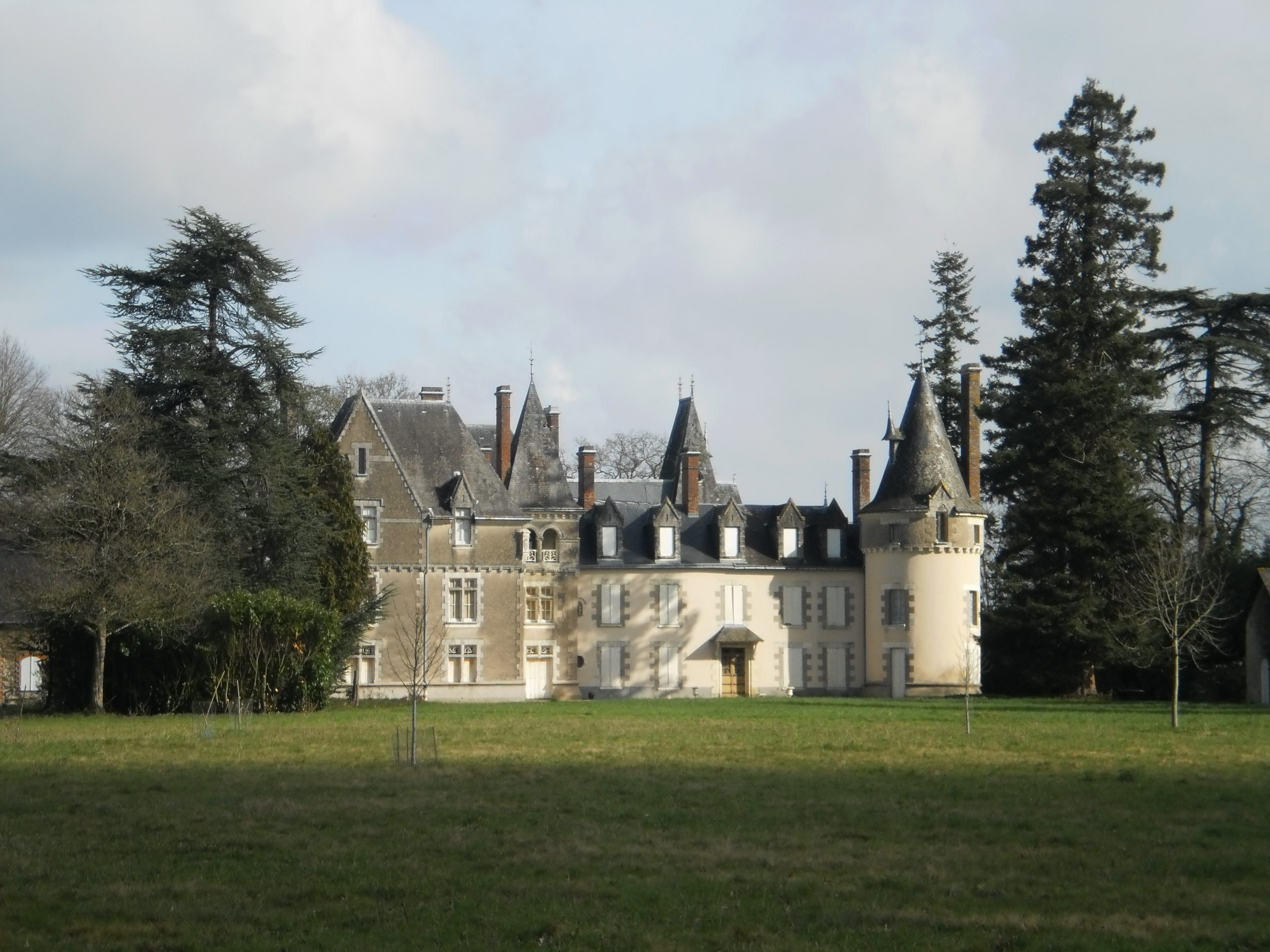 Saint-Sulpice-des-Landes (Loire-Atlantique, France) - château du Coudray